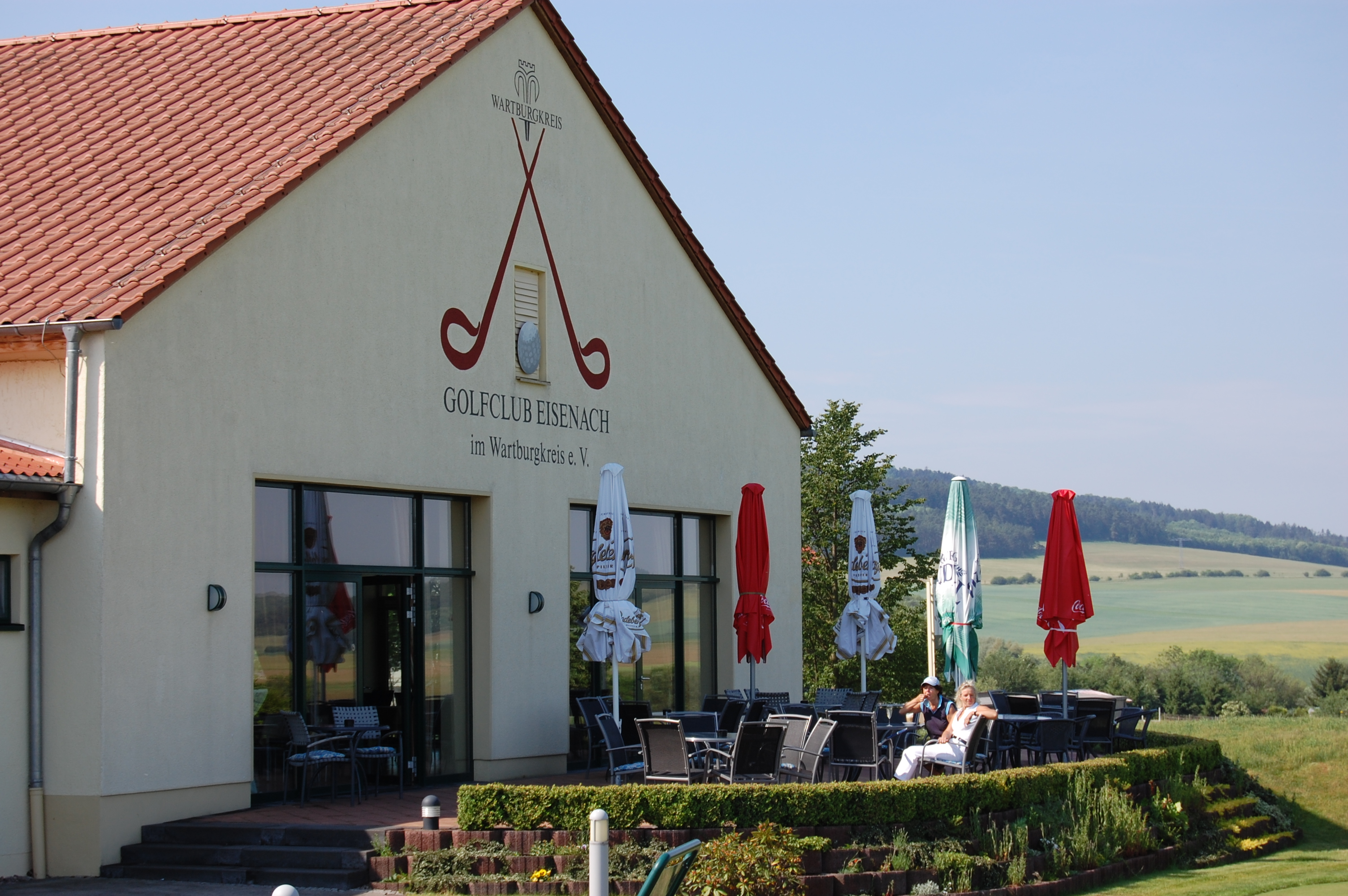 Thüringer Golftrophy Eisenach 033